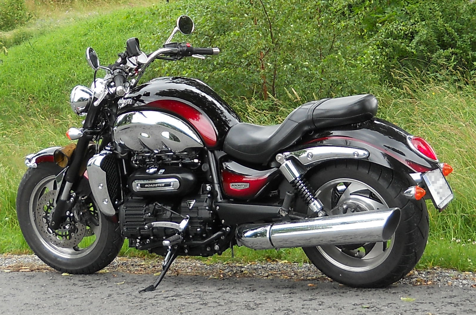 Triumph Rocket 3 Roadster Årsmodell 2012